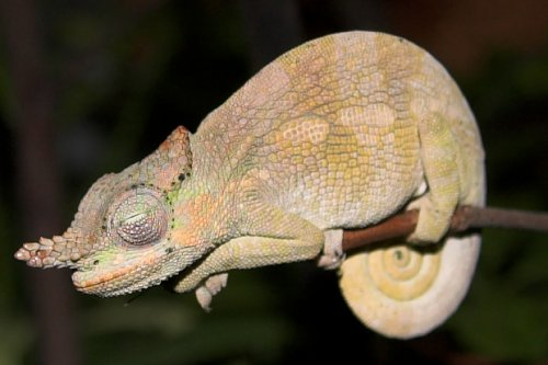 ein schlafendes männliches Zweihornkamäleon; aufgenommen im Terrarium